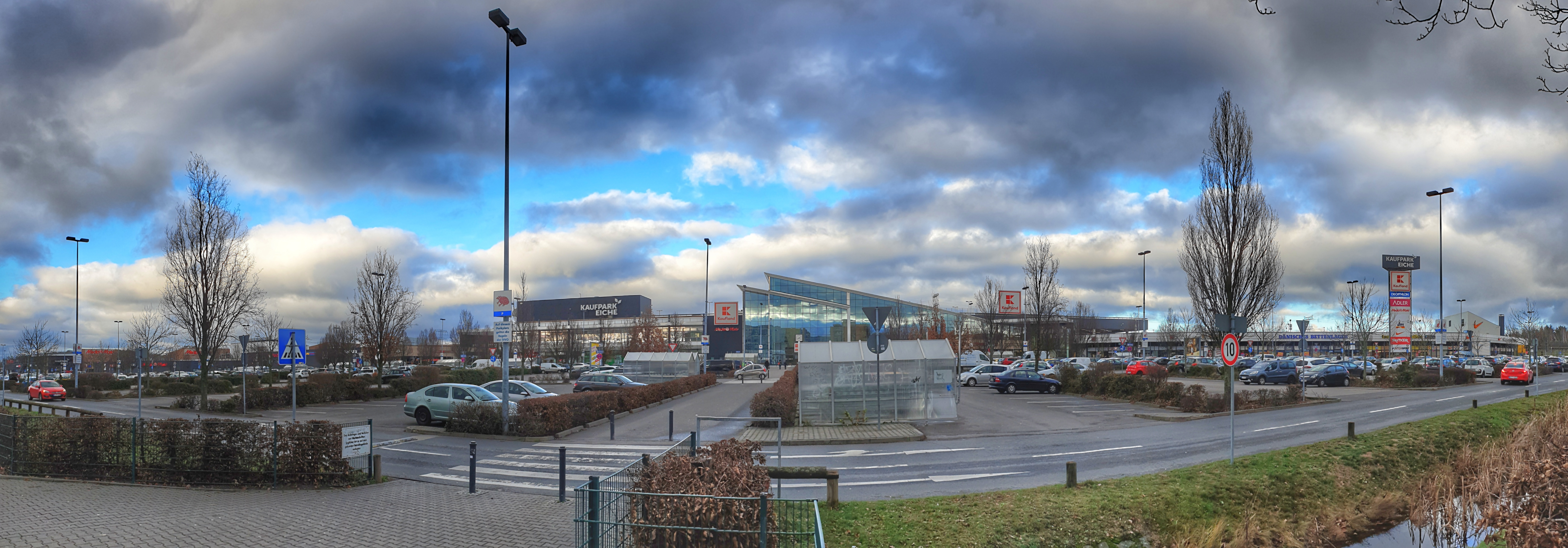 Ansicht des KaufPark Eiche von der Landsberger Chaussee im Januar 2019